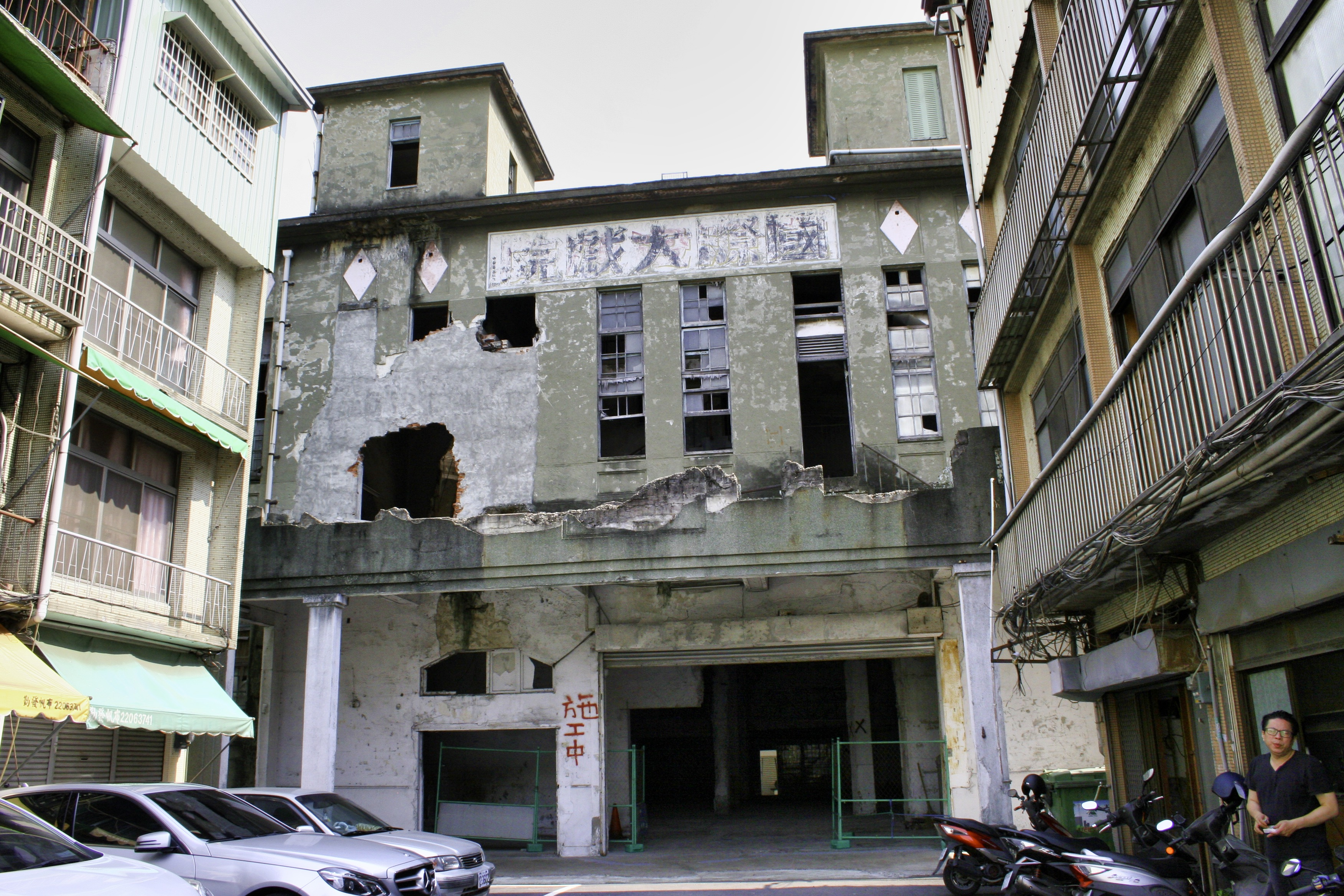 天外天劇場在於西元2020年4月2號準備動工拆除以前的最新照片，旁邊有黑衣人圍事。阻擋外人靠近附近馬路，宣稱公用畫有停車位的道路也歸屬地主所有，阻擋外人靠近。